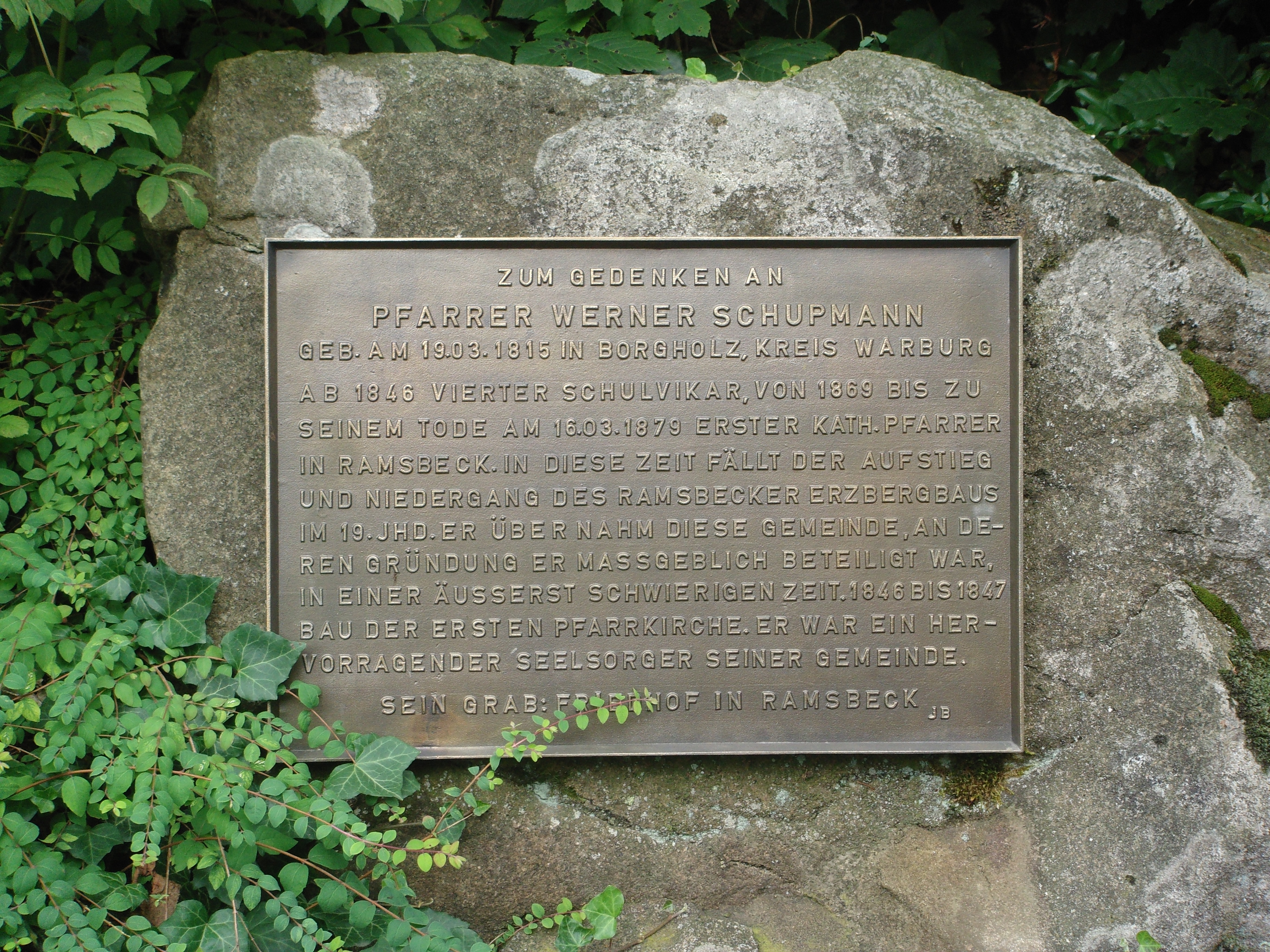 Gedenkstein für Pfarrer Werner Adolph Schupmann (1813 - 1879)